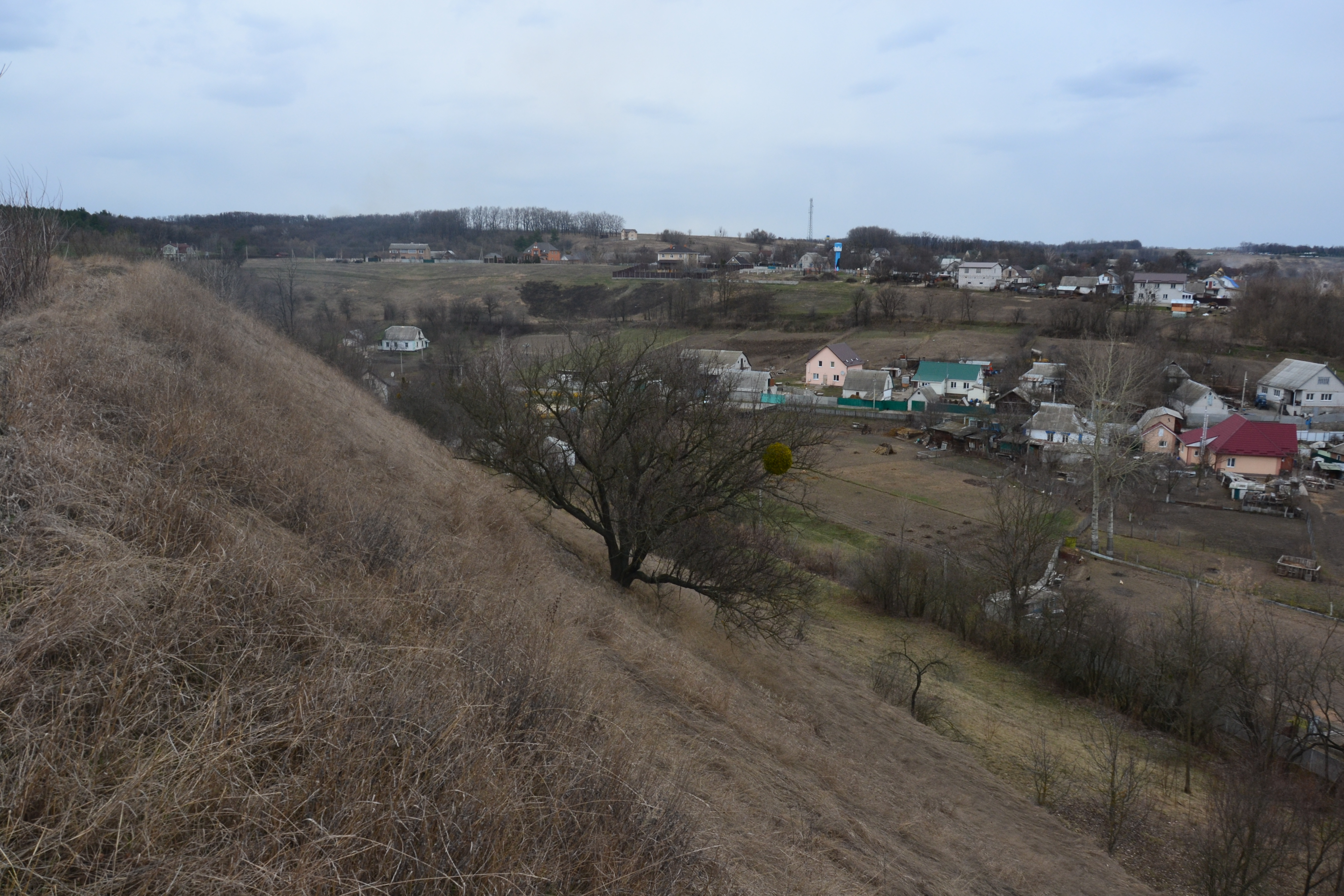 Давньоруське городище в с.Старі Безрадичі (Обухівський район), вал дитинця 3